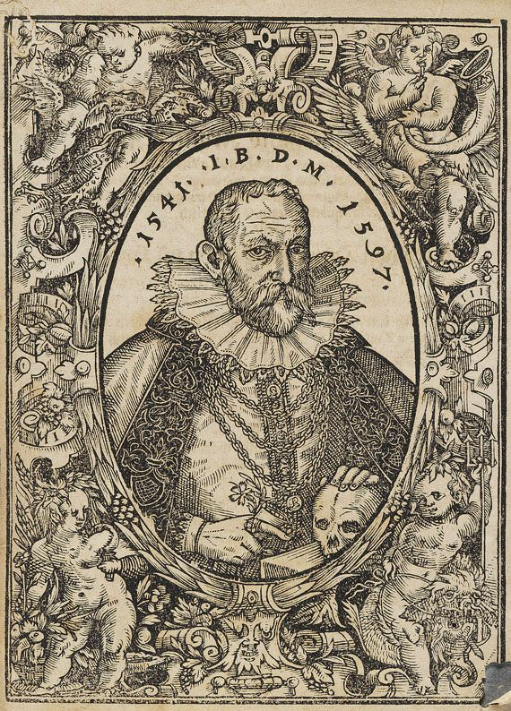 Johann Bauhin, Holzschnitt von 1597